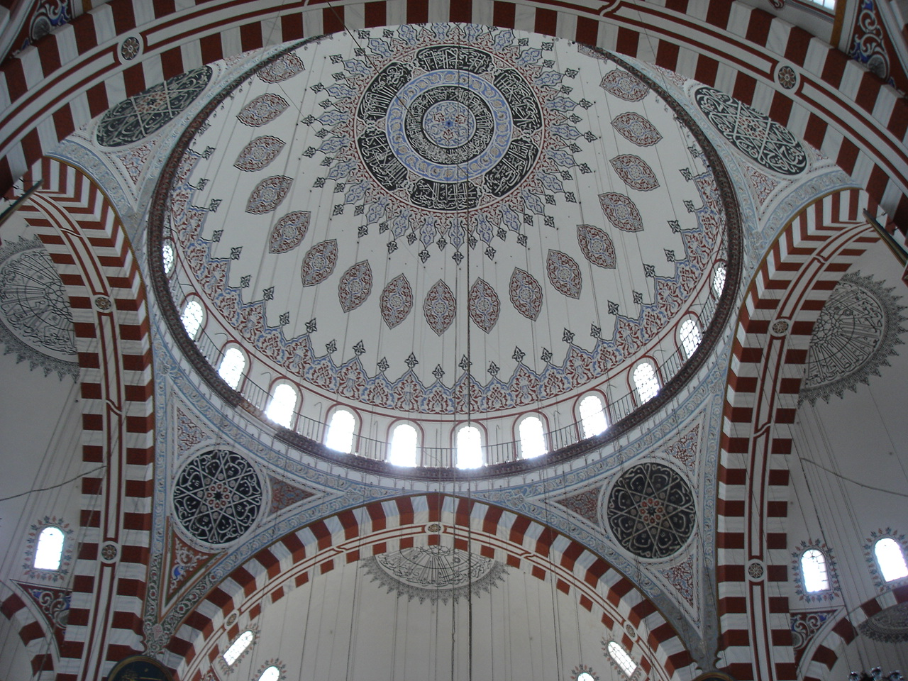 La cupola della Moschea detta Sehzade camii ad Istanbul. Foto di: Giovanni Dall'Orto, 29-5-2006.